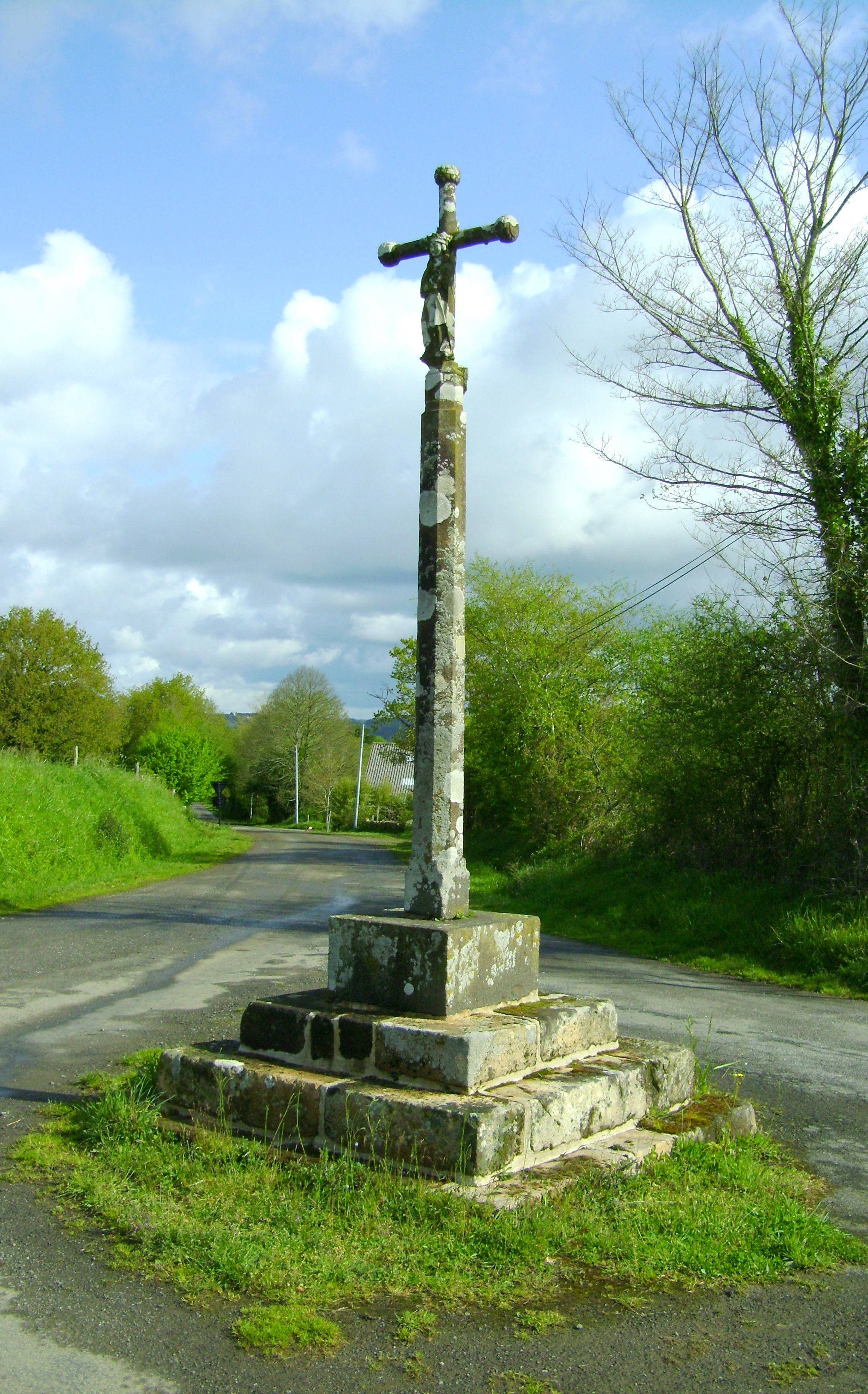 Croix de Pennavern.JPG